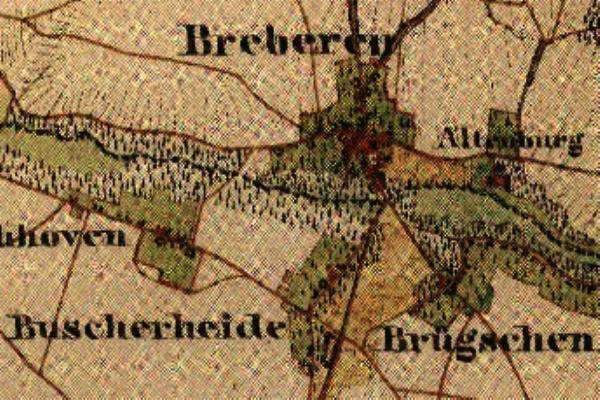 Preußische Kartenaufnahme 1846 -Uraufnahme- (Gangelt)